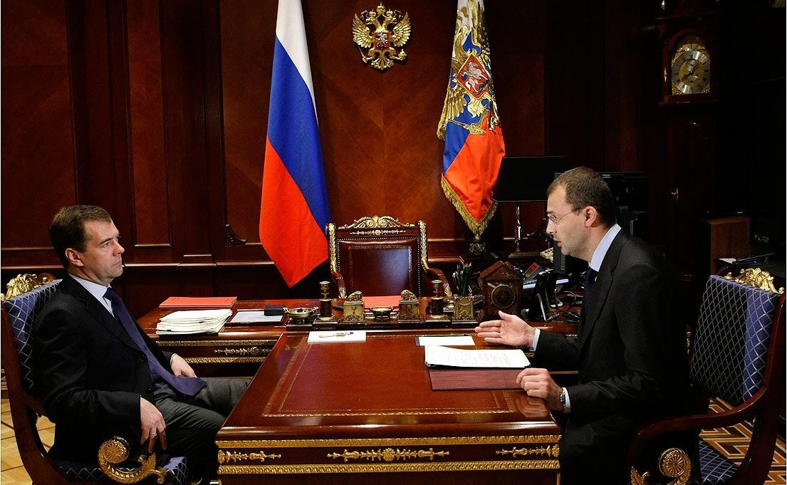 Дмитрий Медведев, Роман Копин